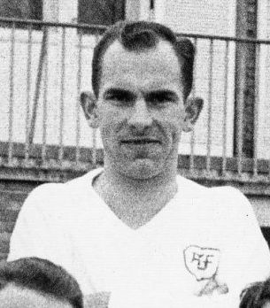 John Amdisen